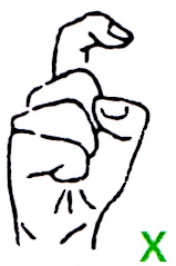 Der Buchstabe X im deutschen Fingeralphabet, entsprechend einer Infokarte des Landesverbandes Bayern der Gehörlosen e.V. (